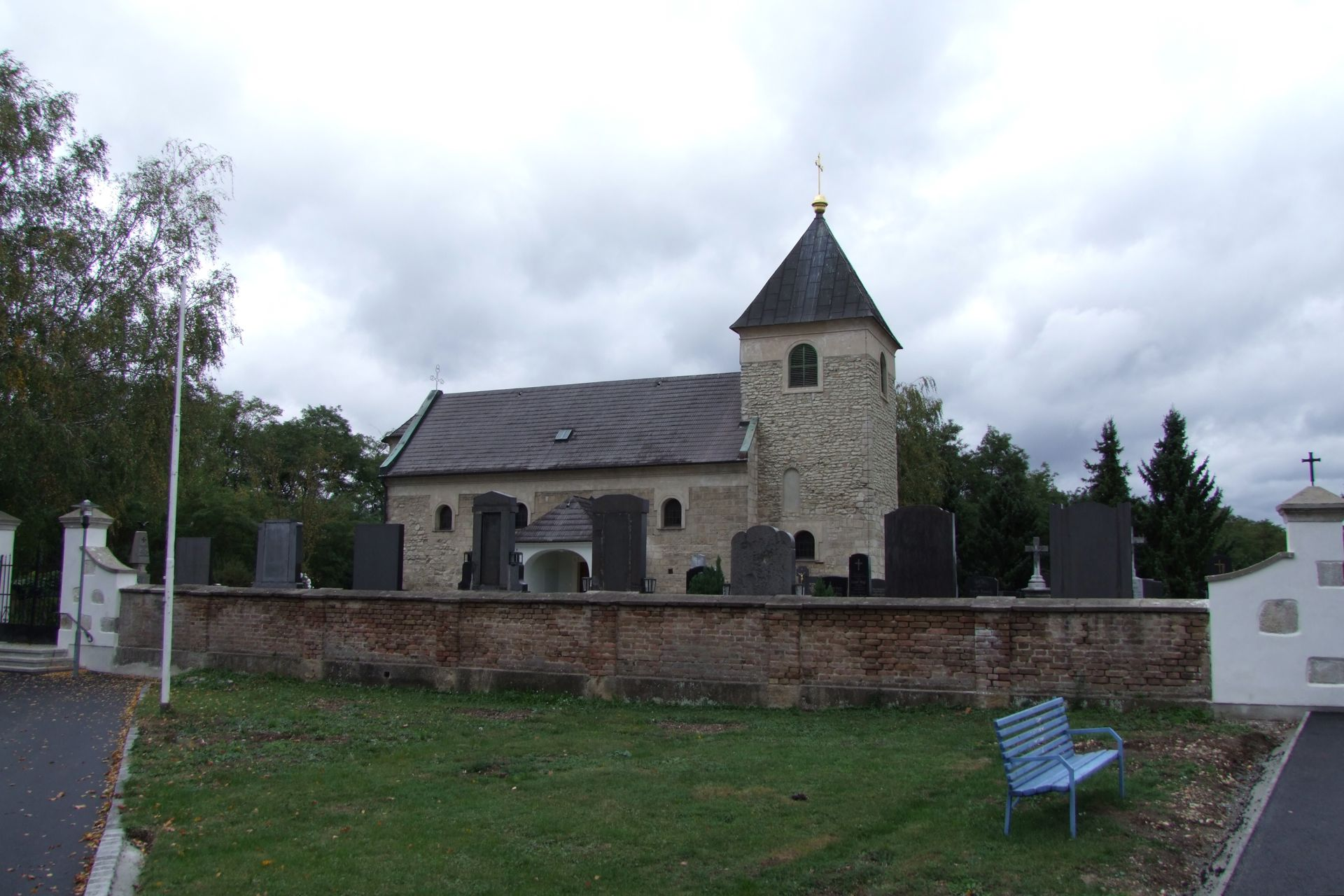 Kath. Filialkirche hl. Markus